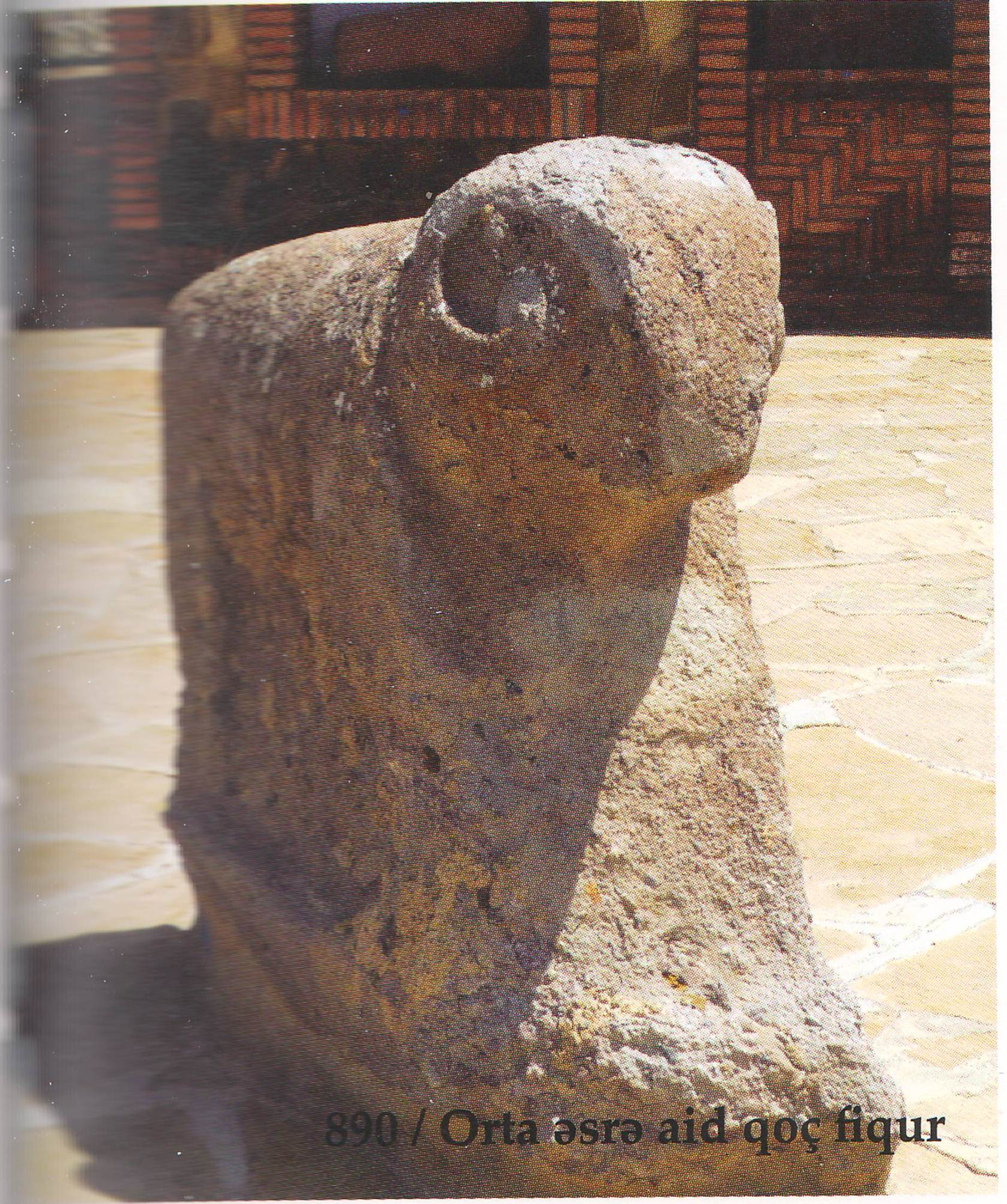 Babək rayon Qoç fiqur